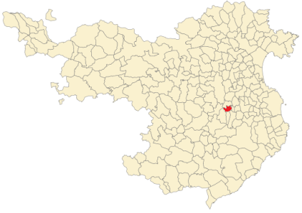 Situación de Bordils en la provincia de Gerona.